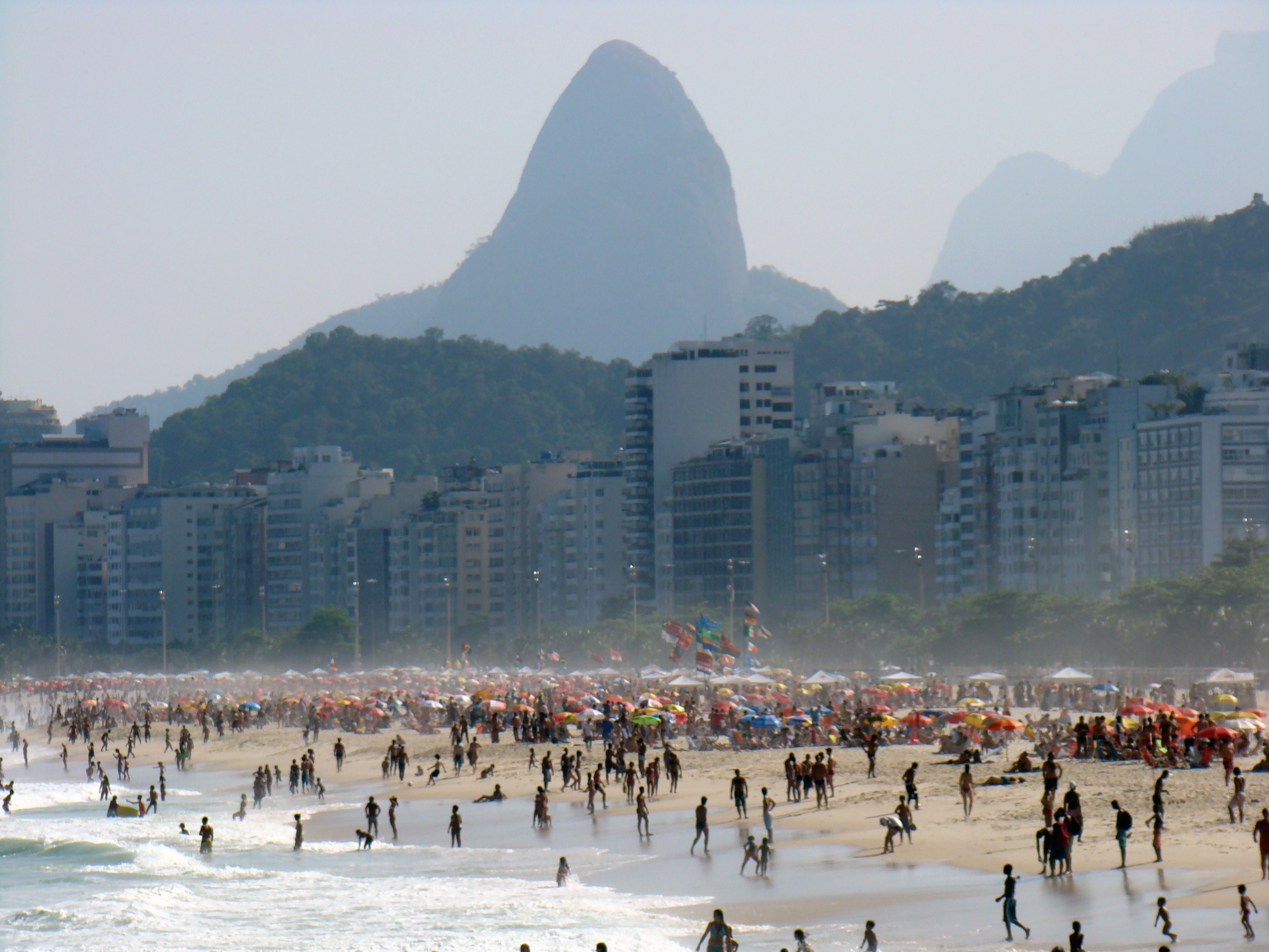 A praia de Copacabana localiza-se no bairro de mesmo nome, na zona Sul da cidade do Rio de Janeiro, no Brasil.